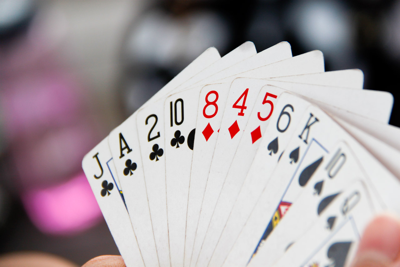 Hand holding playing cards.